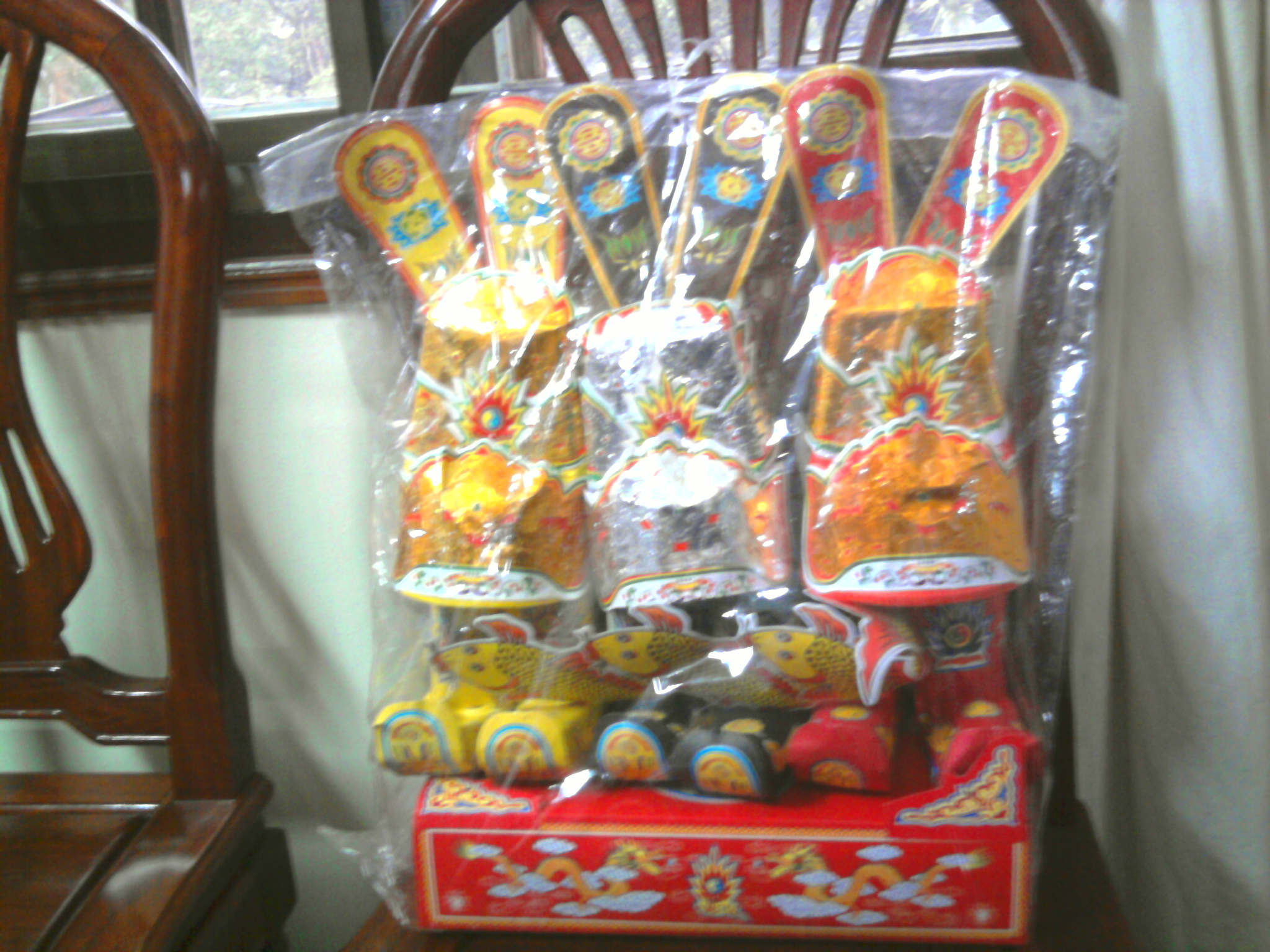 Bộ đồ ông Táo (chụp trước mặt, ở xa).